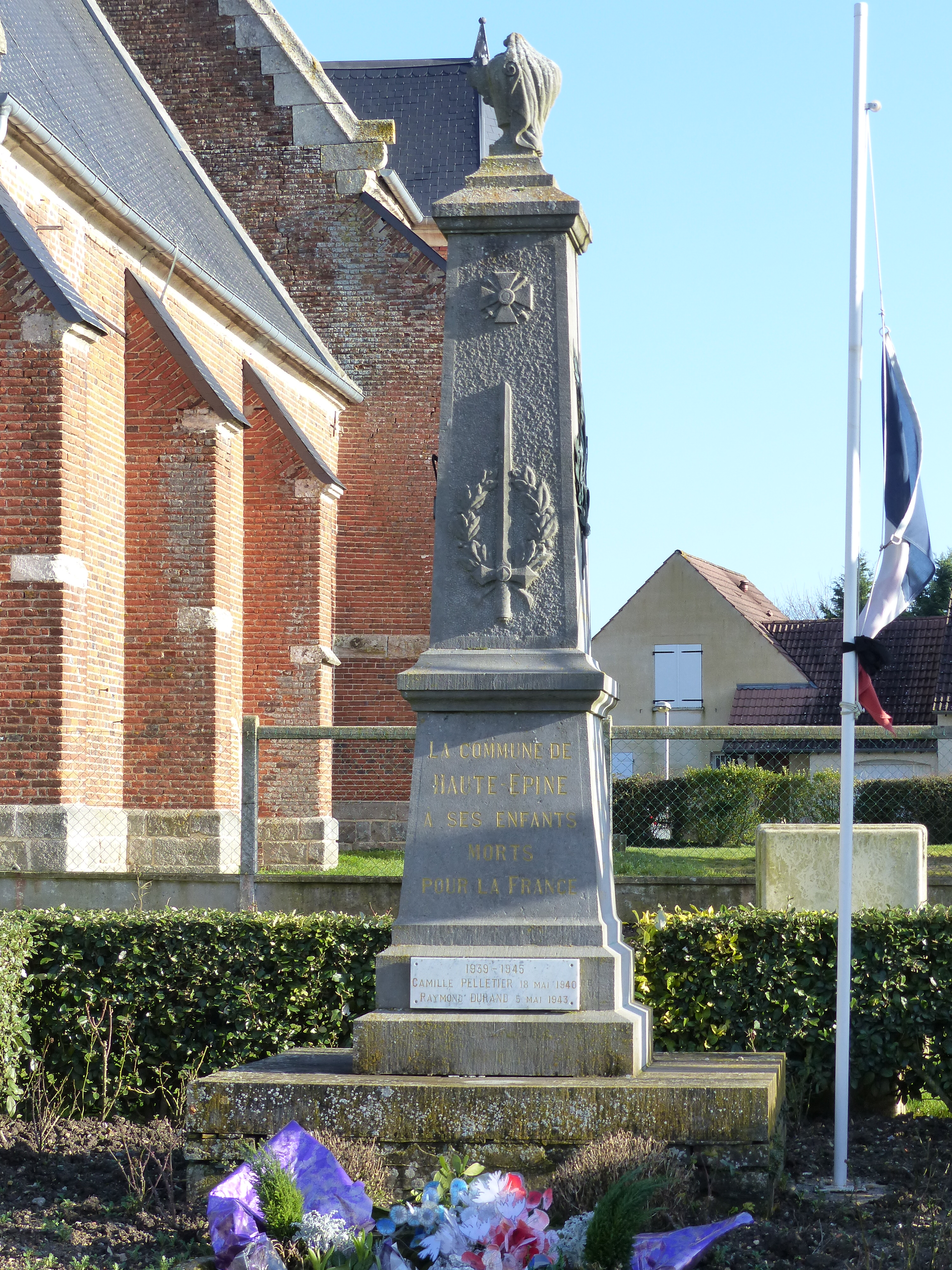 Monument aux morts de Haute-Épine